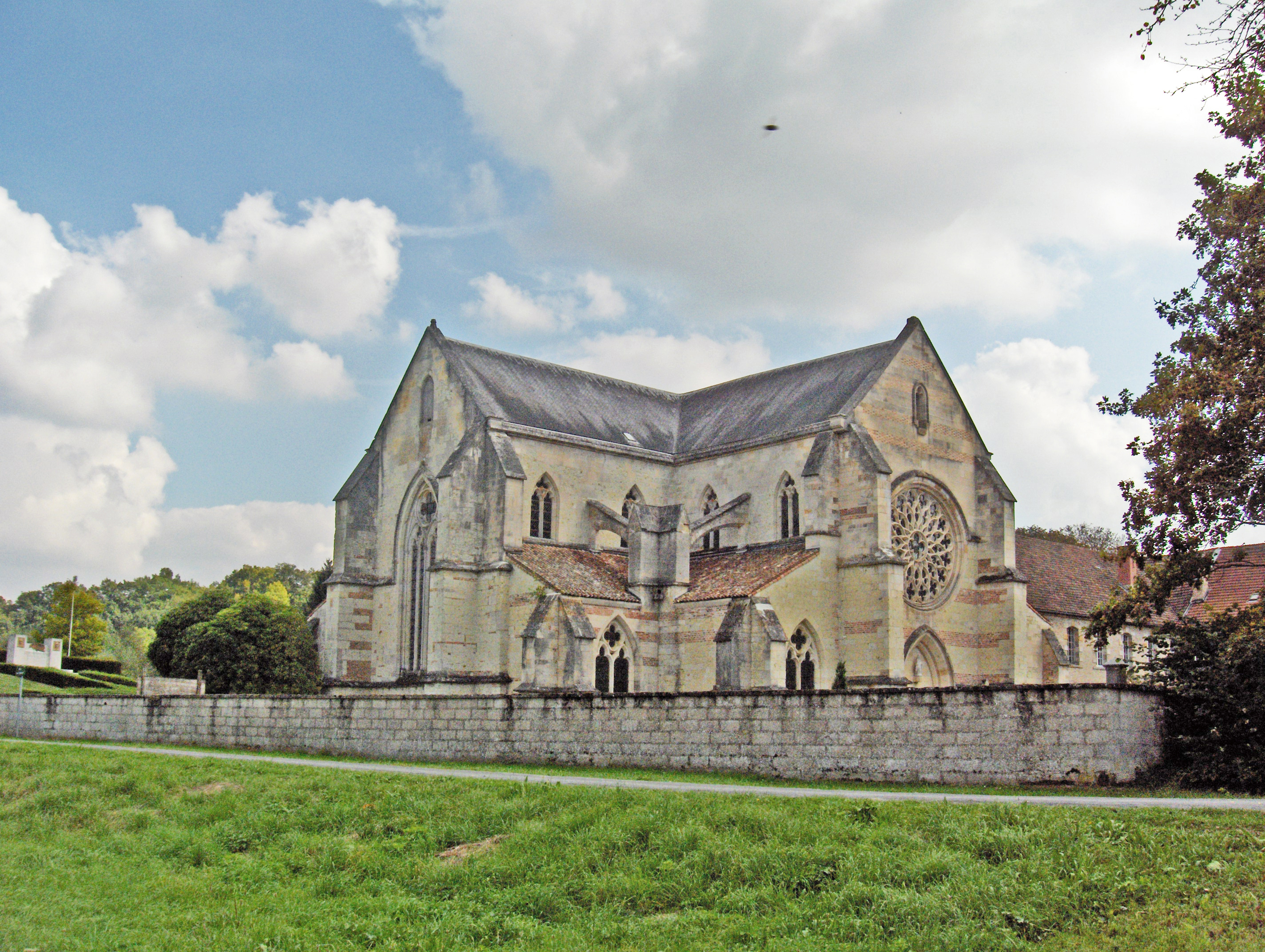 Abbaye cistercienne de la Chalade aux Islettes (Meuse)